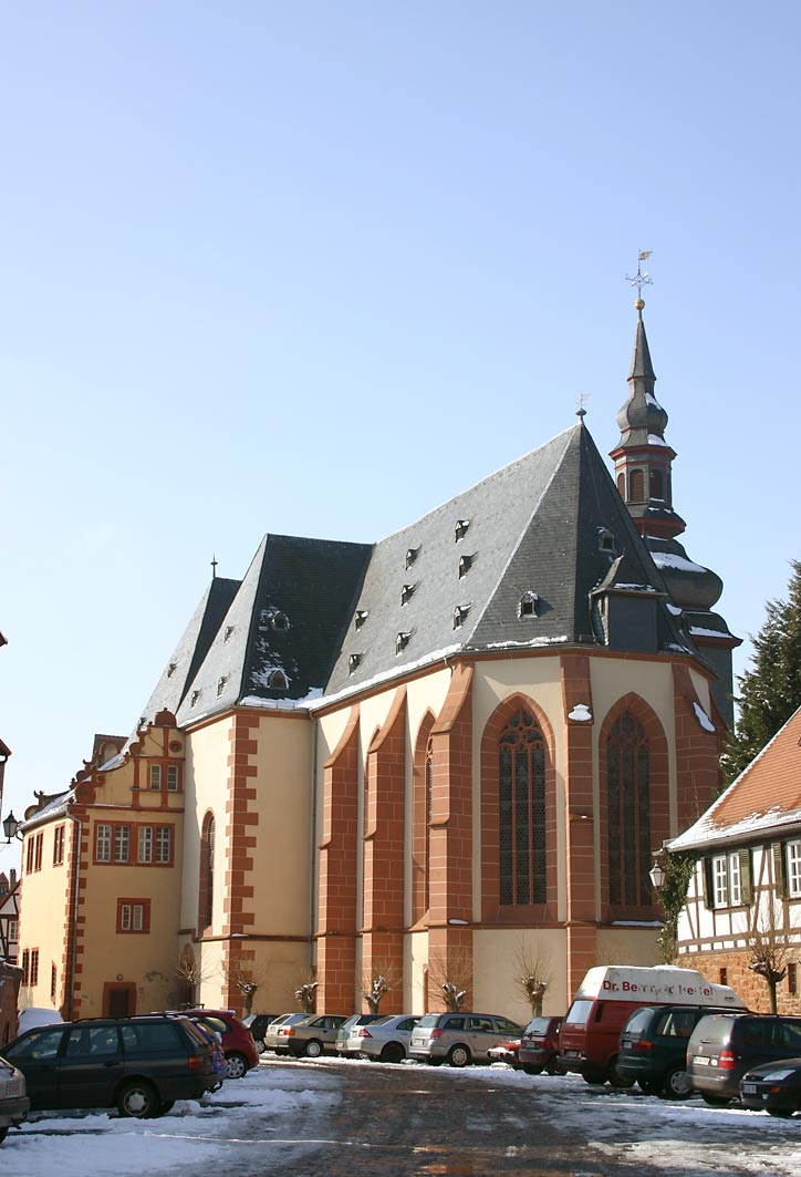 Die Marienkirche in Büdingen, Südfront im Winter.